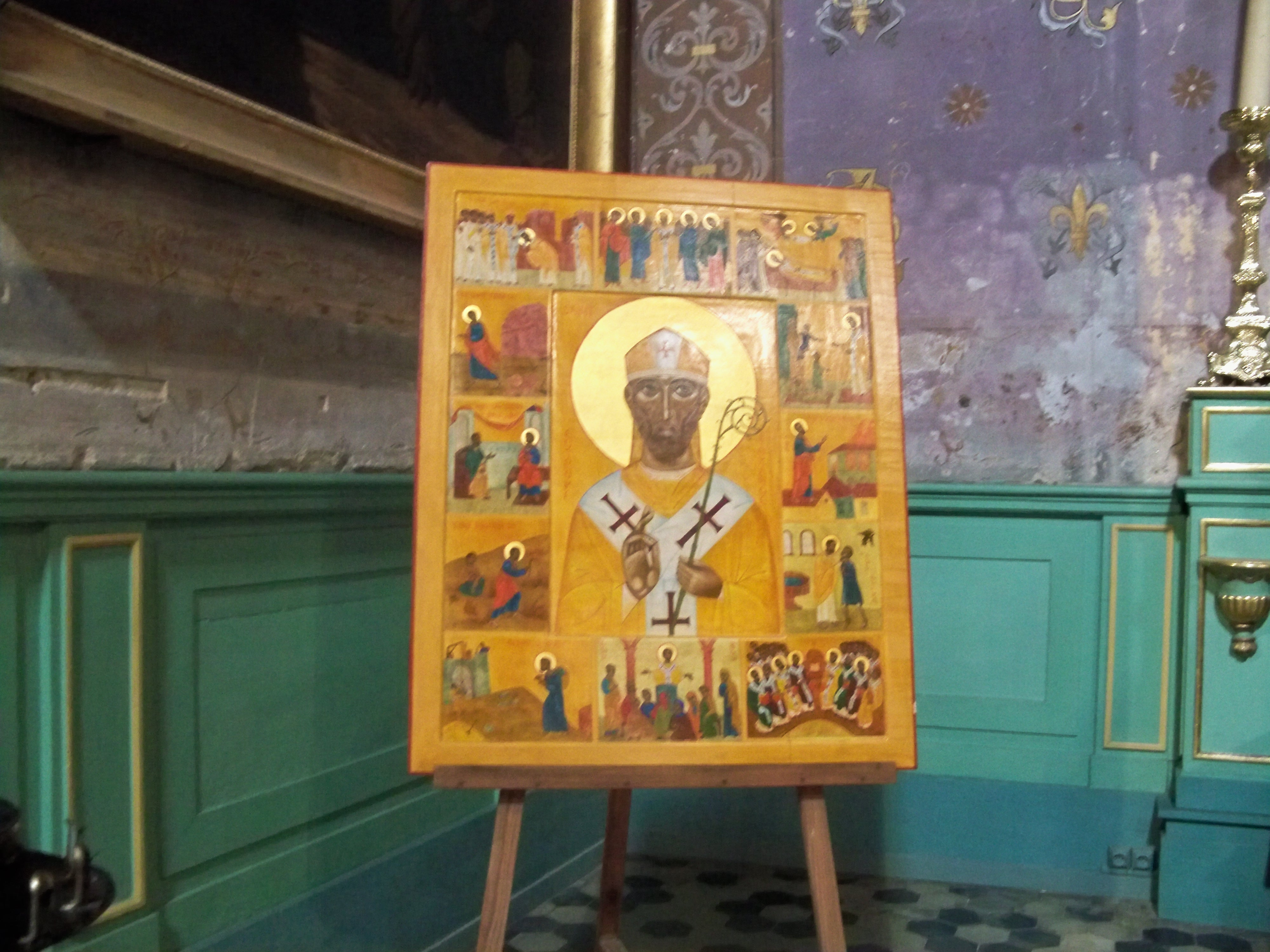 tableau de Saint Eutrope, dans la cathédrale Notre Dame de Nazareth à Orange, Vaucluse, France